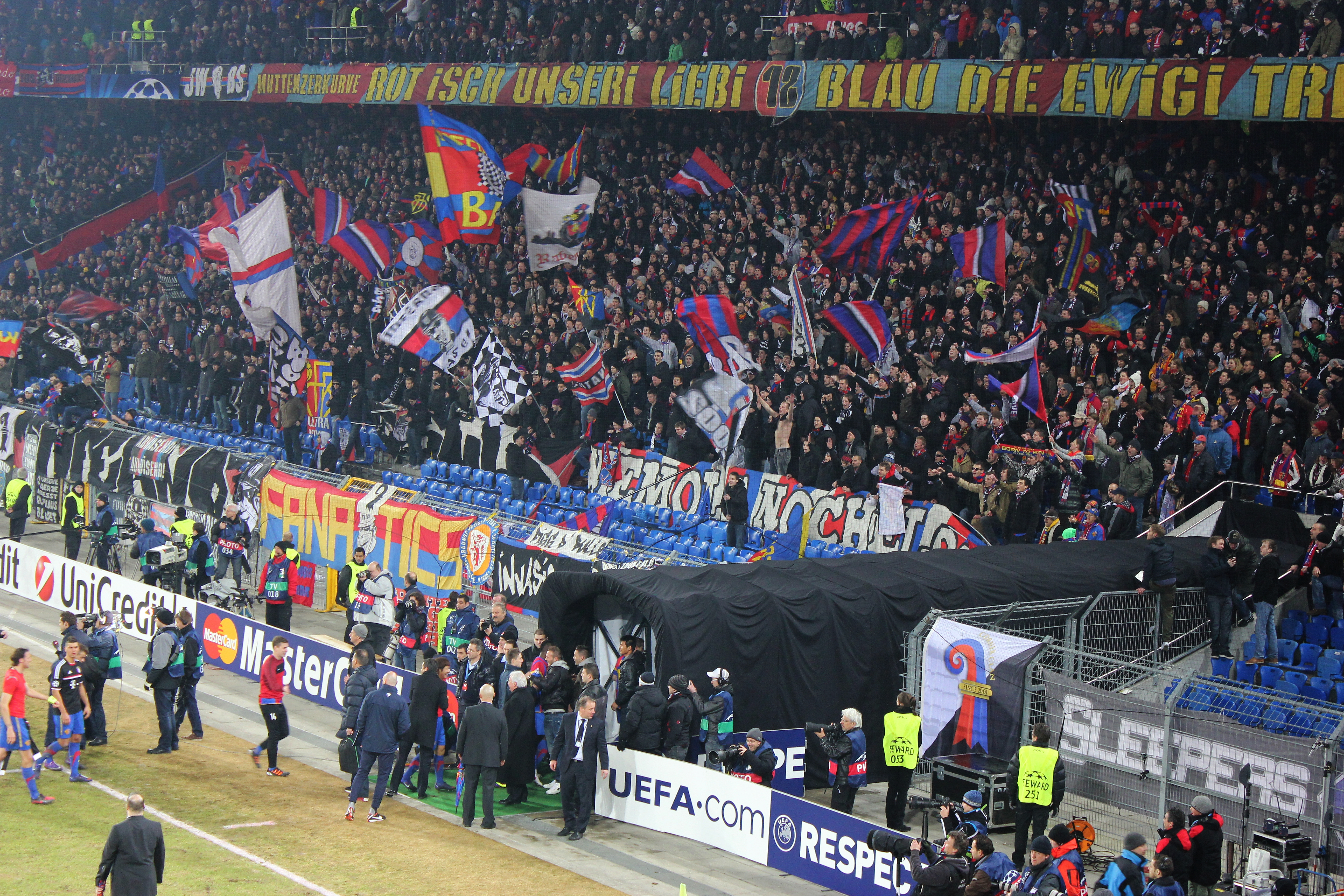 Basel, St.-Jakob-Park - Muttenzer Kurve. UEFA Champions League 2011-2012, Achtelfinale Hinspiel (round of 16, first leg), FC Basel - FC Bayern München 1:0.